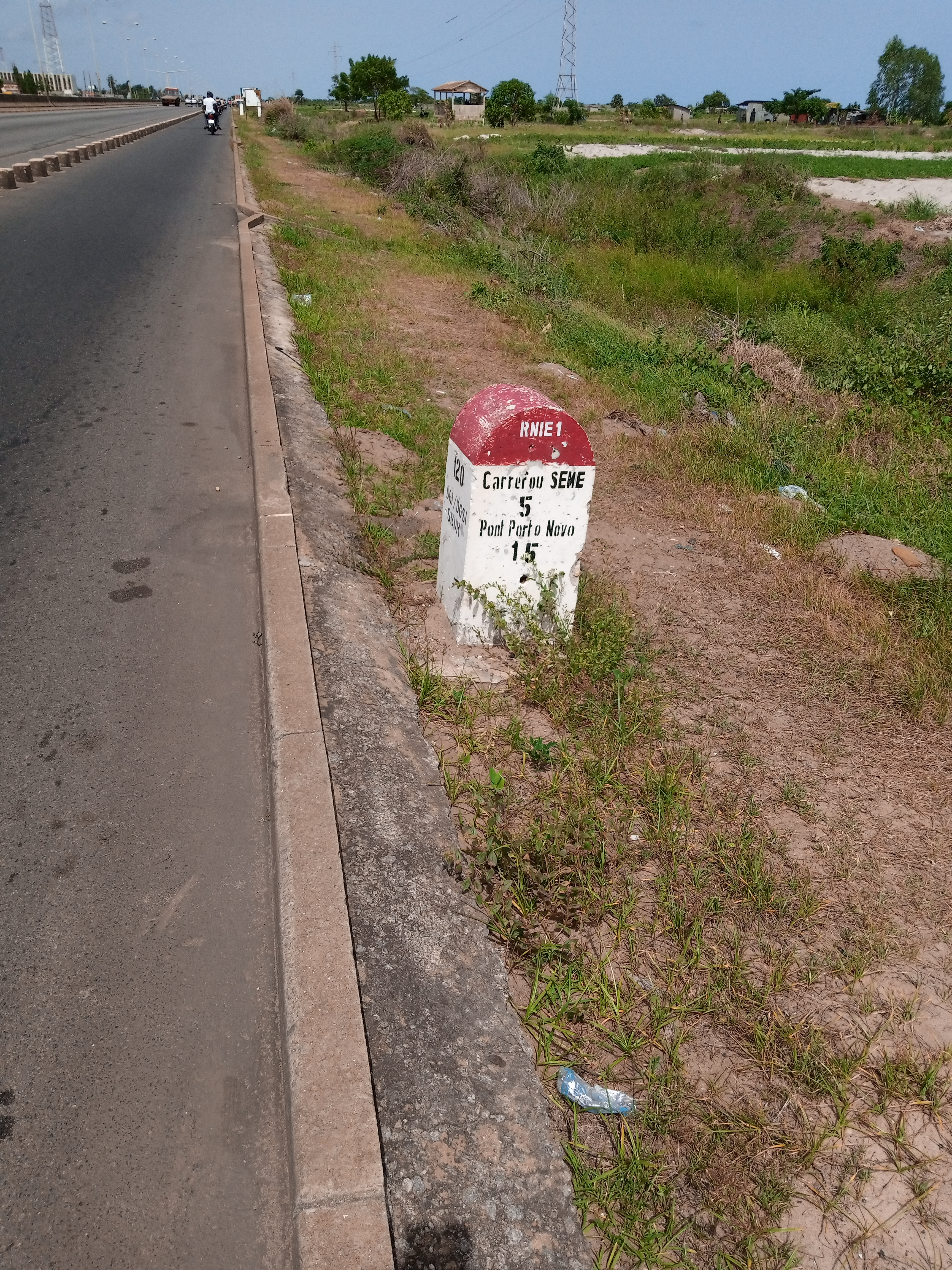 borne kilométrique à Sèmè Podji This is an image with the theme "Africa on the Move or Transport" from: Benin